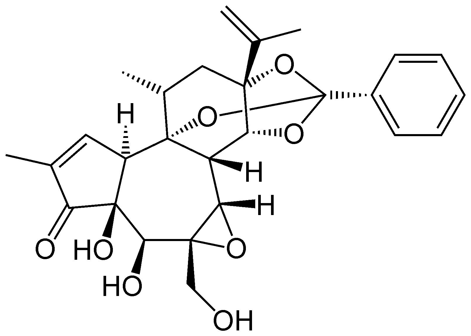 Daphnetoxin